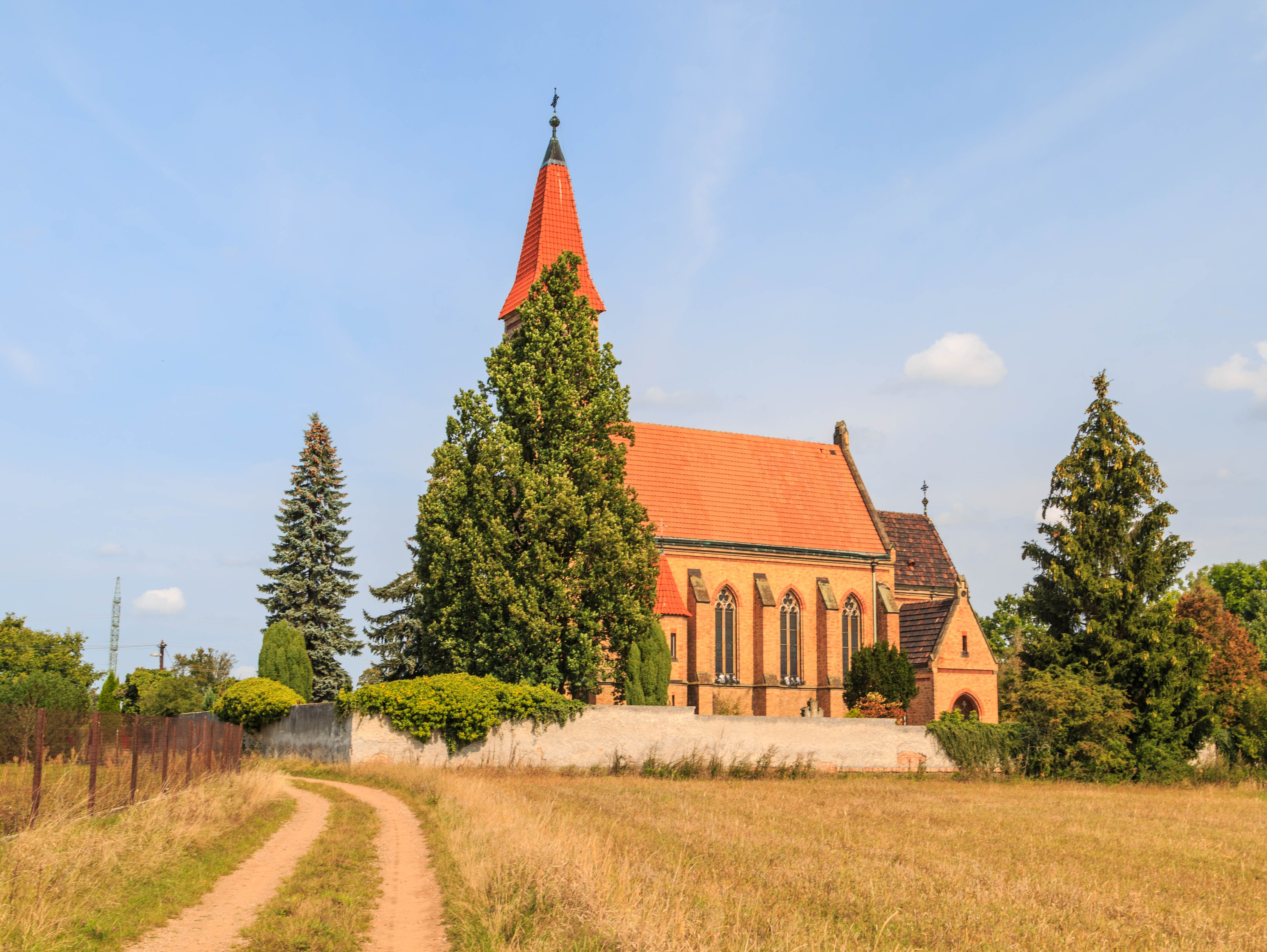 Kostel svatého Vavřince, východní část, Selmice.